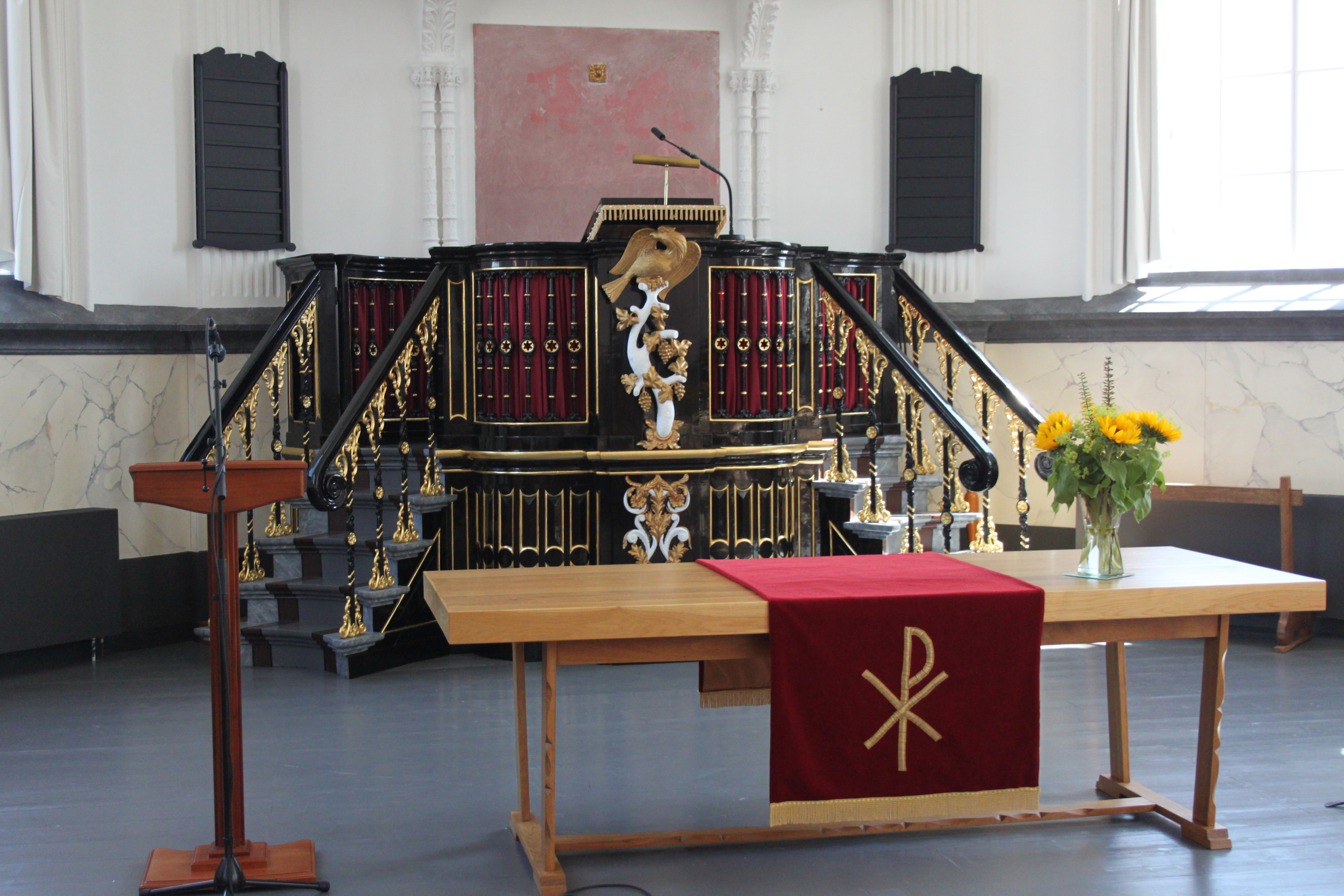 Baaium, Terp 21 - Ned. Hervormde Kerk - anno 1876